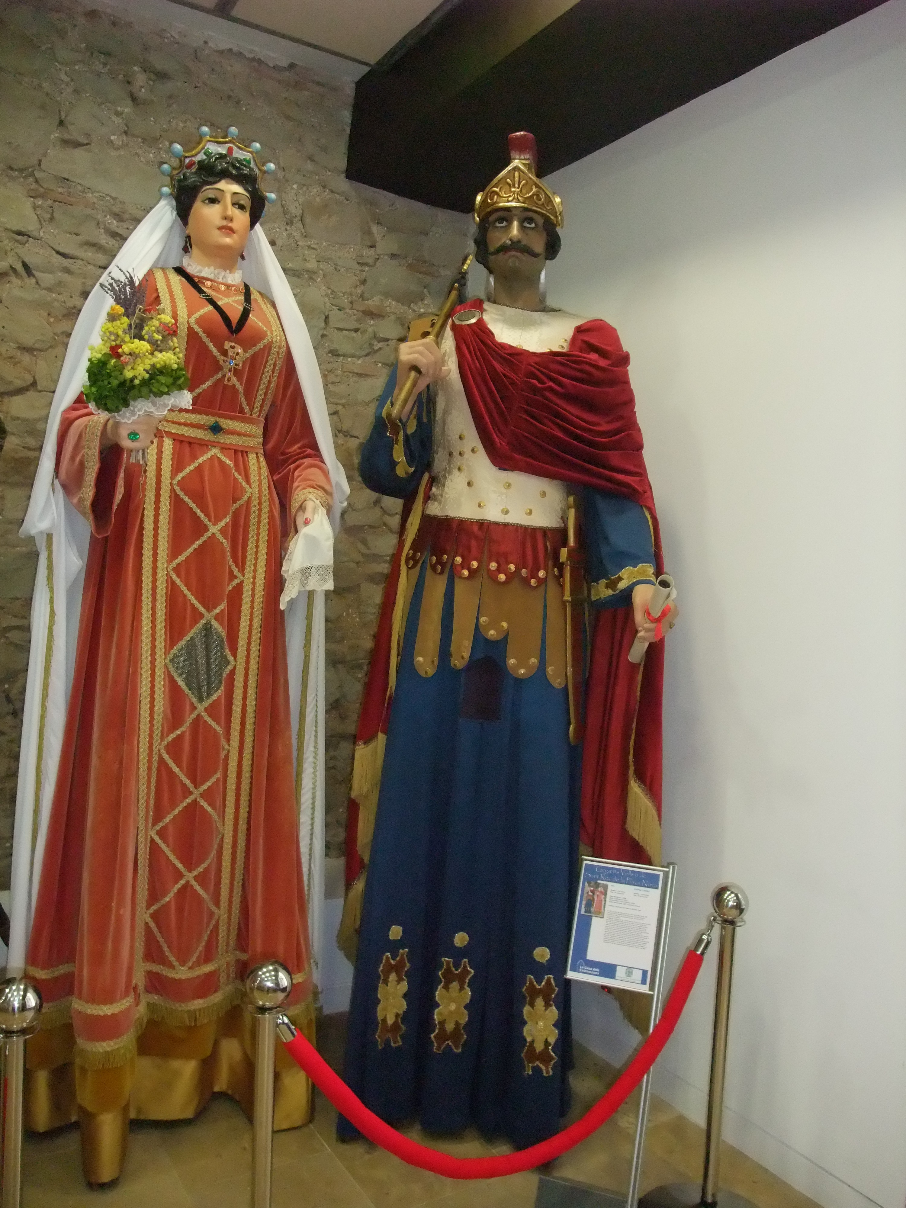 Barcelona-Palacio de la Virreina-Exposición de gigantes y dragones (III)